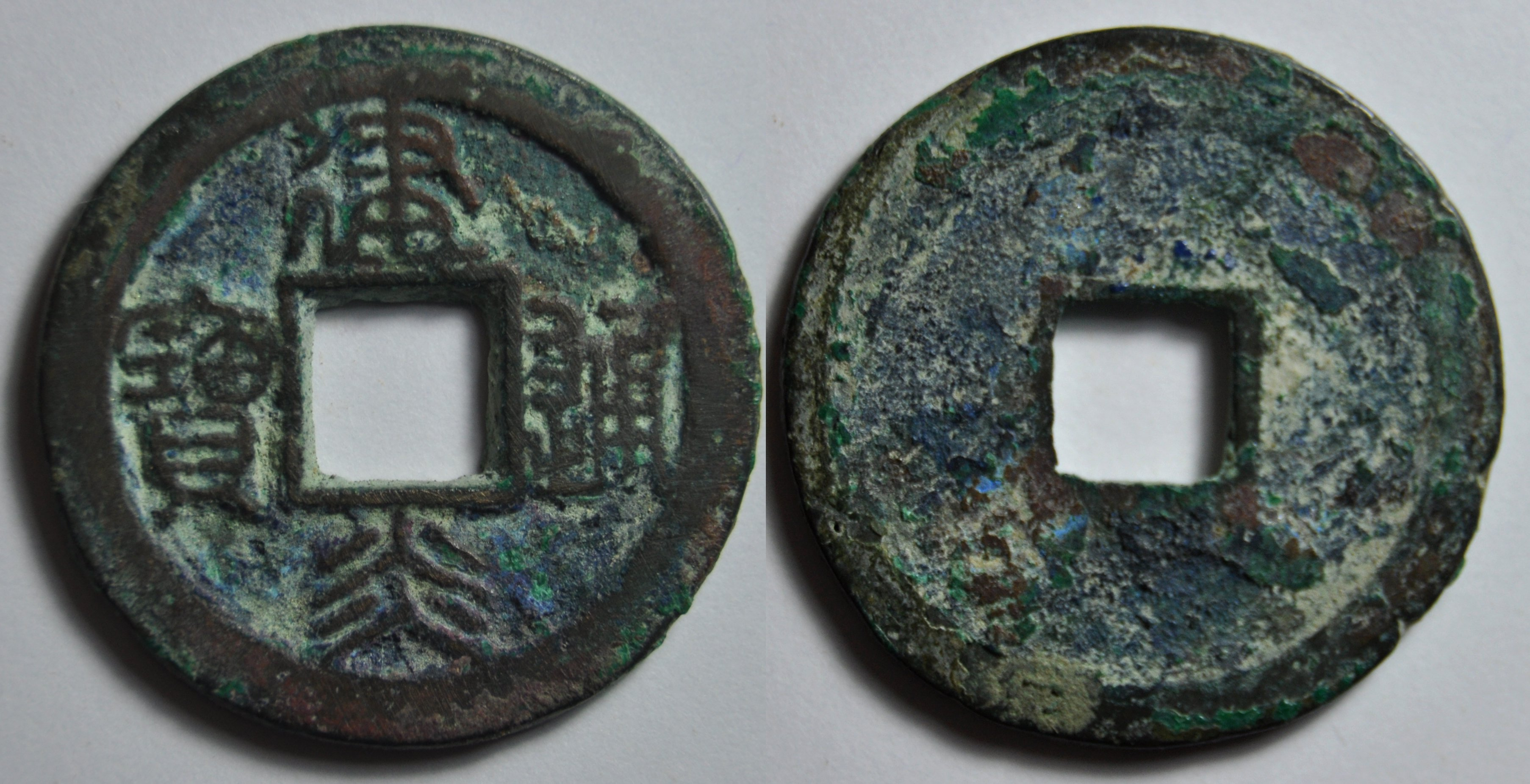 Une monnaie en bronze d'une sapèque (1 cash) de l'empereur Gao Zong (1127-1162), premier empereur de la dynastie des Song du Sud (1127-1279), ère Jian Yan (1127-1130) en caractère sigillaire.A/ Jian Yan tong bao (monnaie courante de l'ère Jian Yan en lecture en croix)R/ vide Dimension : 24,42 mm Poids : 3,9 g. Rebord large et caractères fins.Remarque : L'empereur Gao Zong est le 9ème fils de l'empereur Hui Zong et un demi-frère de l'empereur Qin Zong qui ont été capturés par les Jin.Indice de rareté : 8 (assez commune). La monnaie est en excellent état.